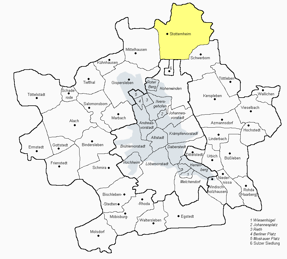 Stadtteilkarte von Erfurt, Stotternheim hervorgehoben